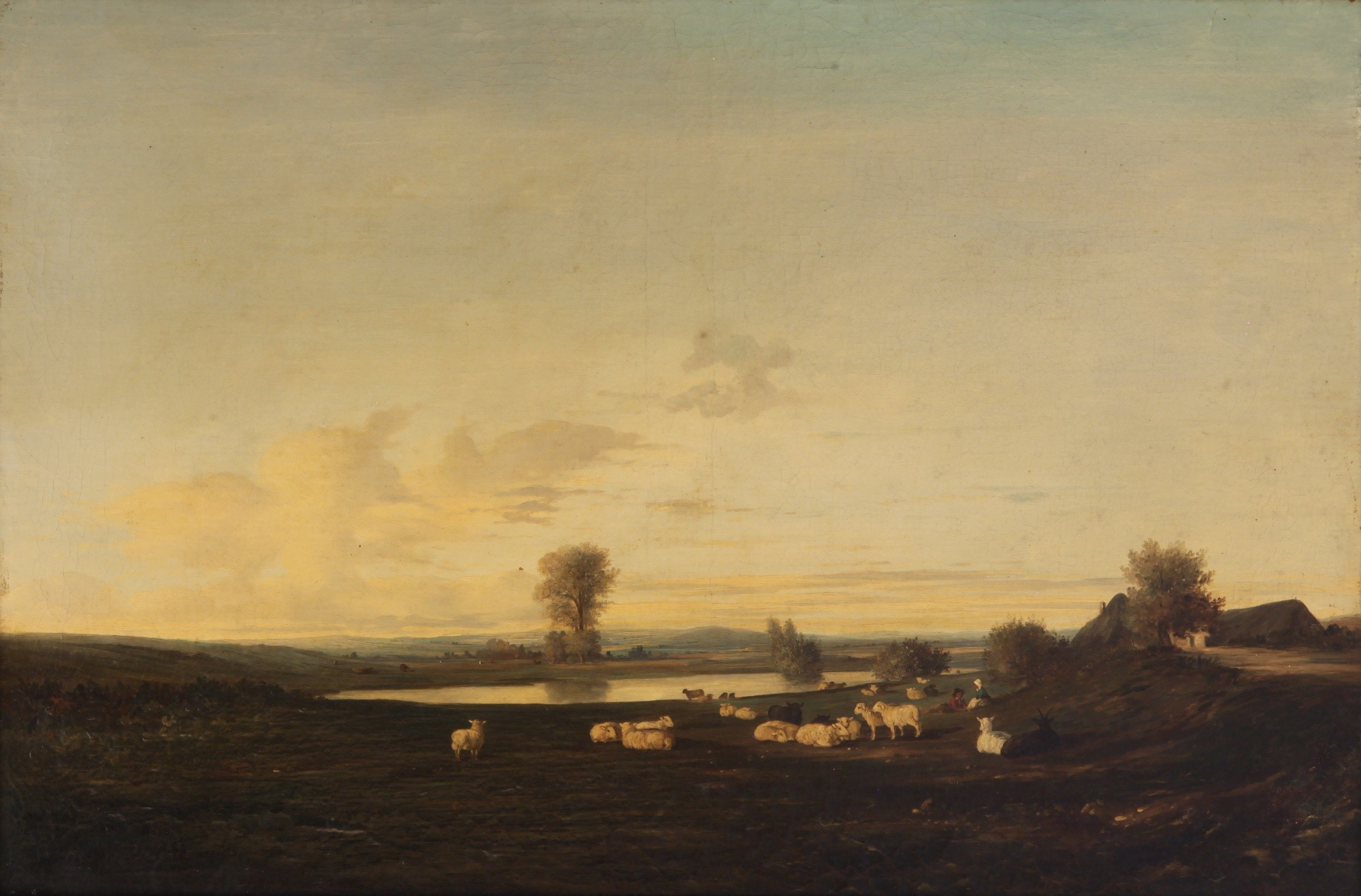 Léon-Victor Dupré, Paisaje con figuras y animales. Siglo XIX. 49 x 72,5 cm, con marco: 69 x 93 5,5 x 10,5 cm, óleo sobre tela. Inv. 2726.